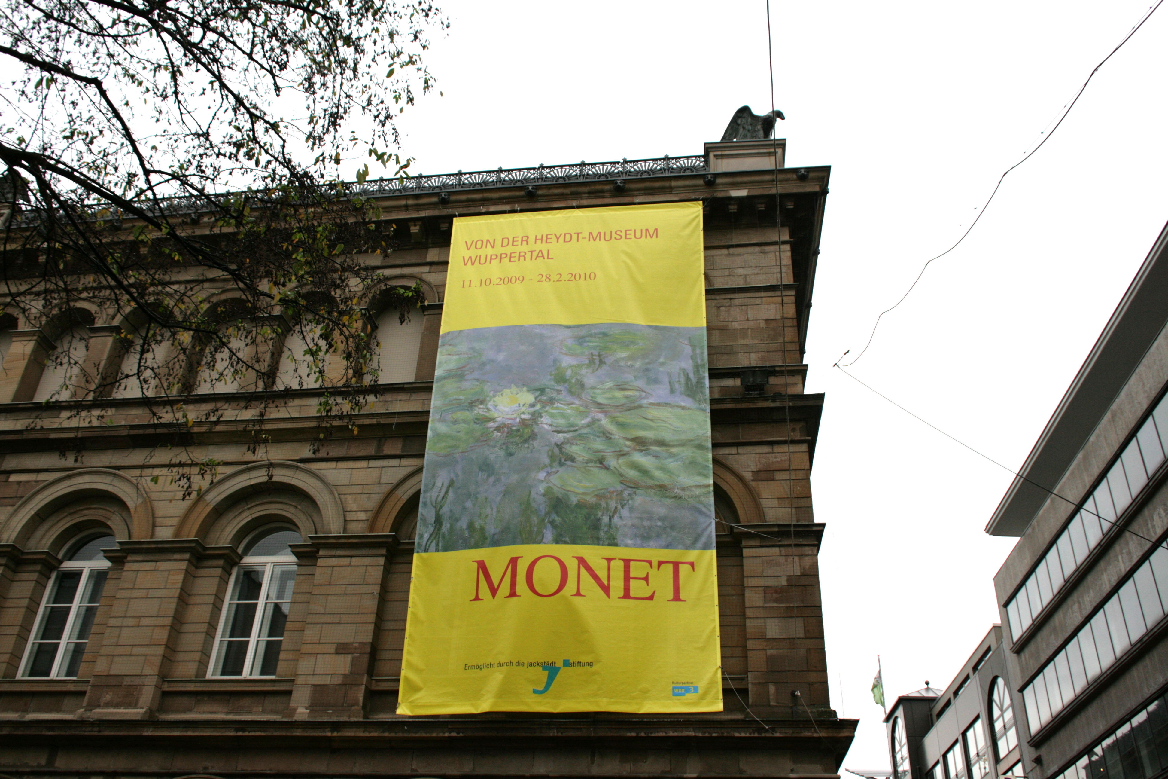 Monet exhibition in the Von-der-Heydt-Museum, Wuppertal